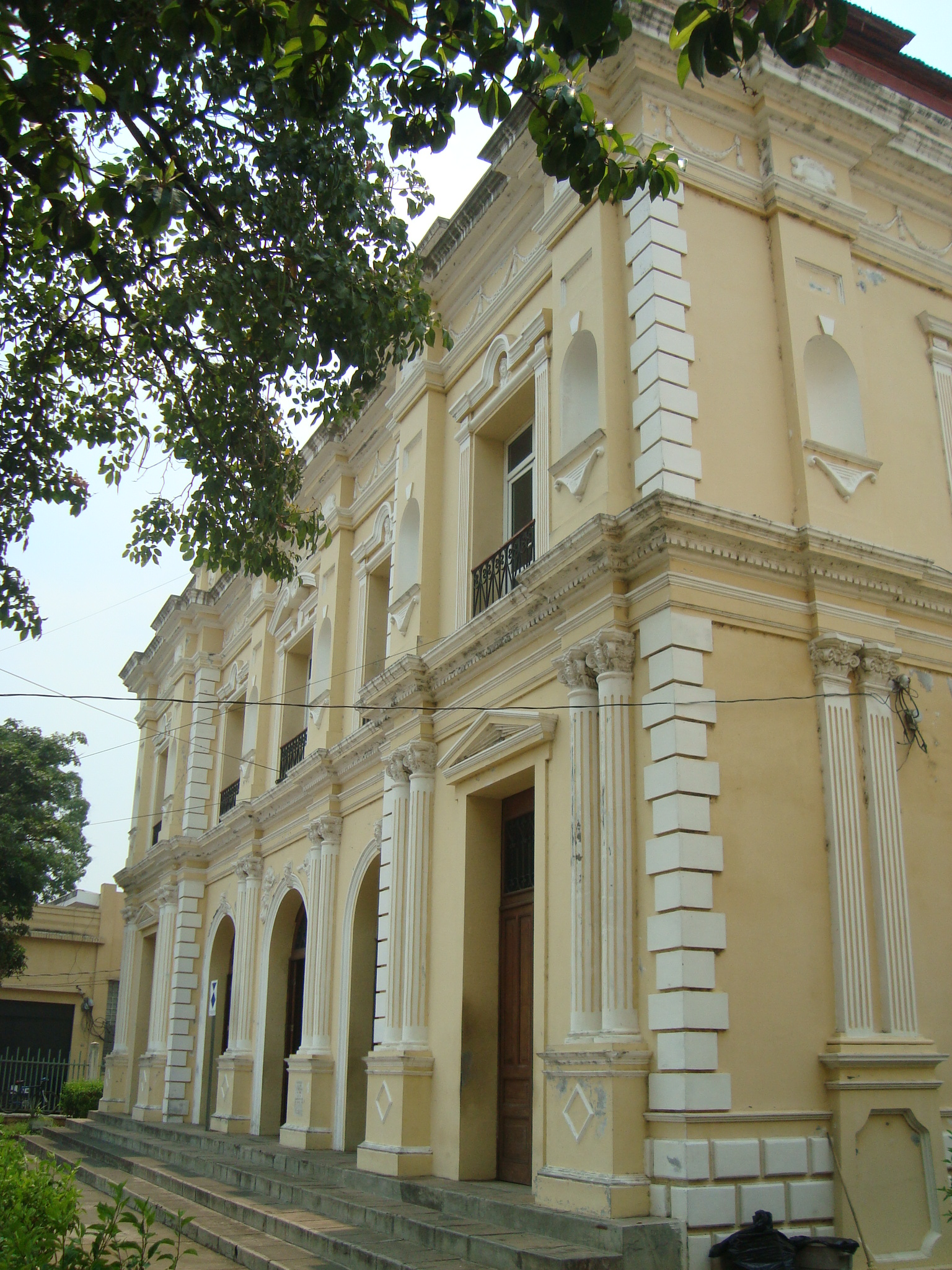 CENTRO HISTÓRICO DE SAN MIGUEL